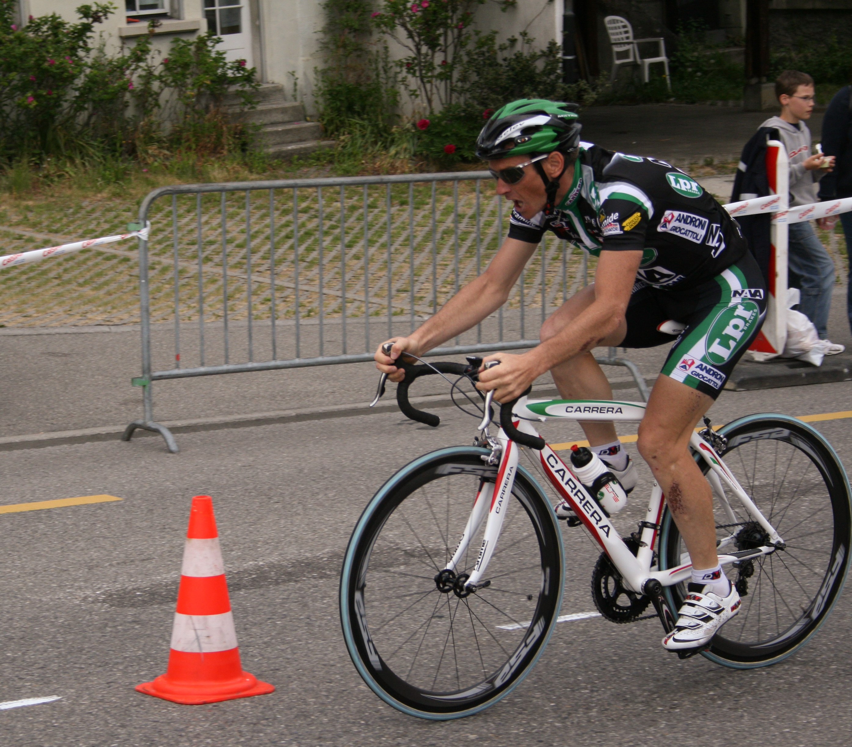 Roger_Beuchat prologue du Tour de Romandie 2007